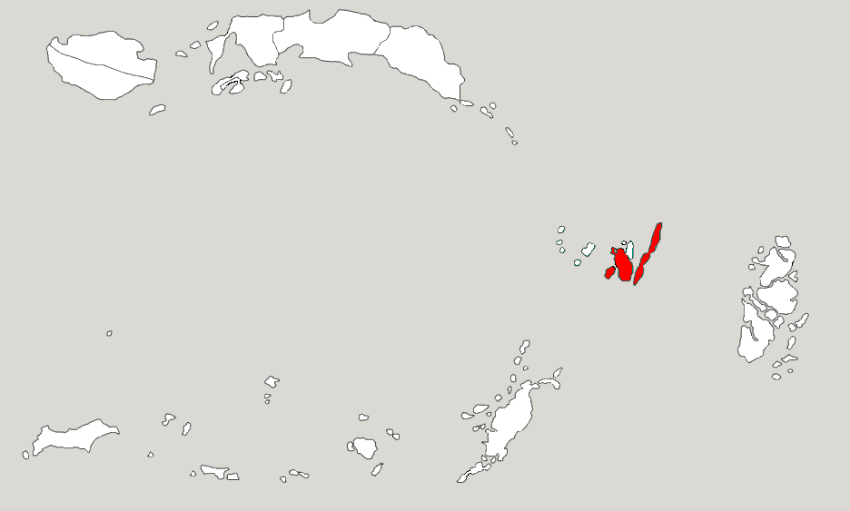 Округ Південно-Східне Малуку